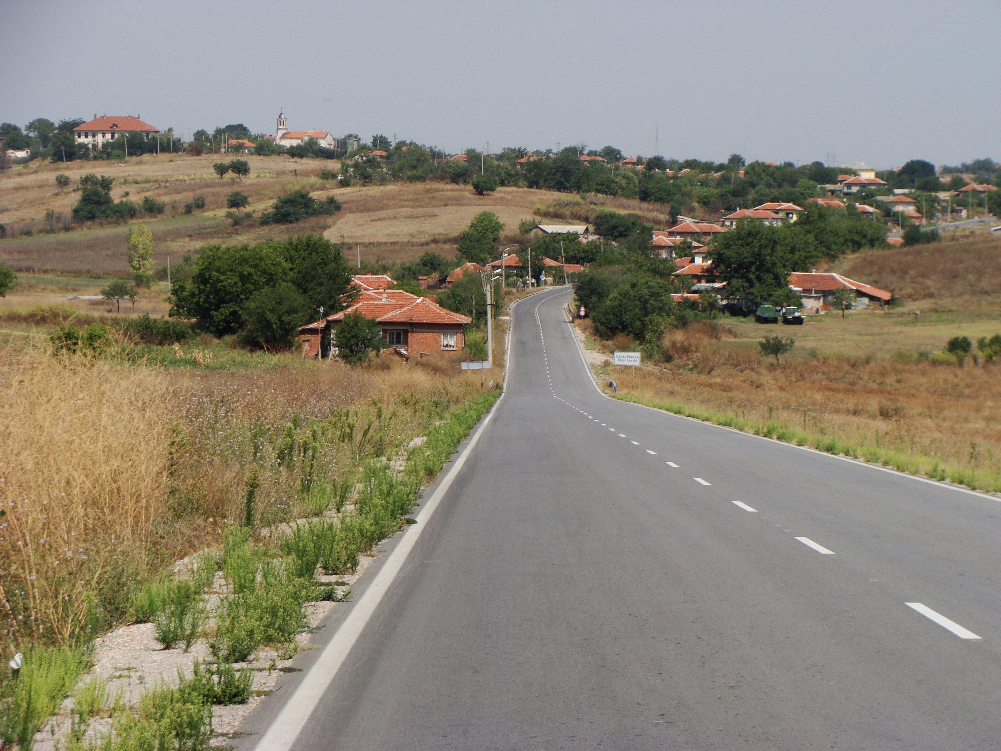 с. В.Левски от юг, изглед от шосе III-503 Ст. Загора - Симеоновград